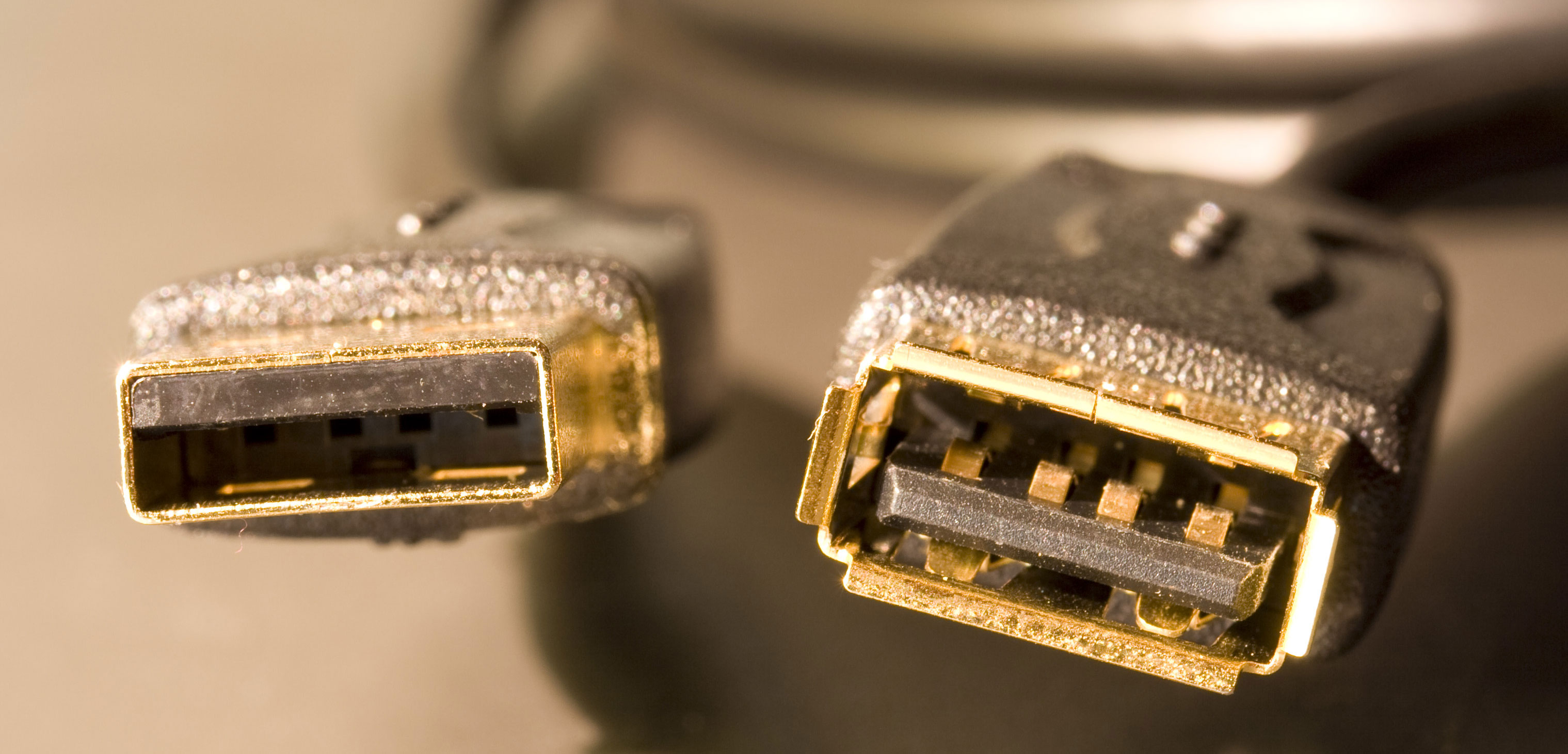 USB Steck-Verl.